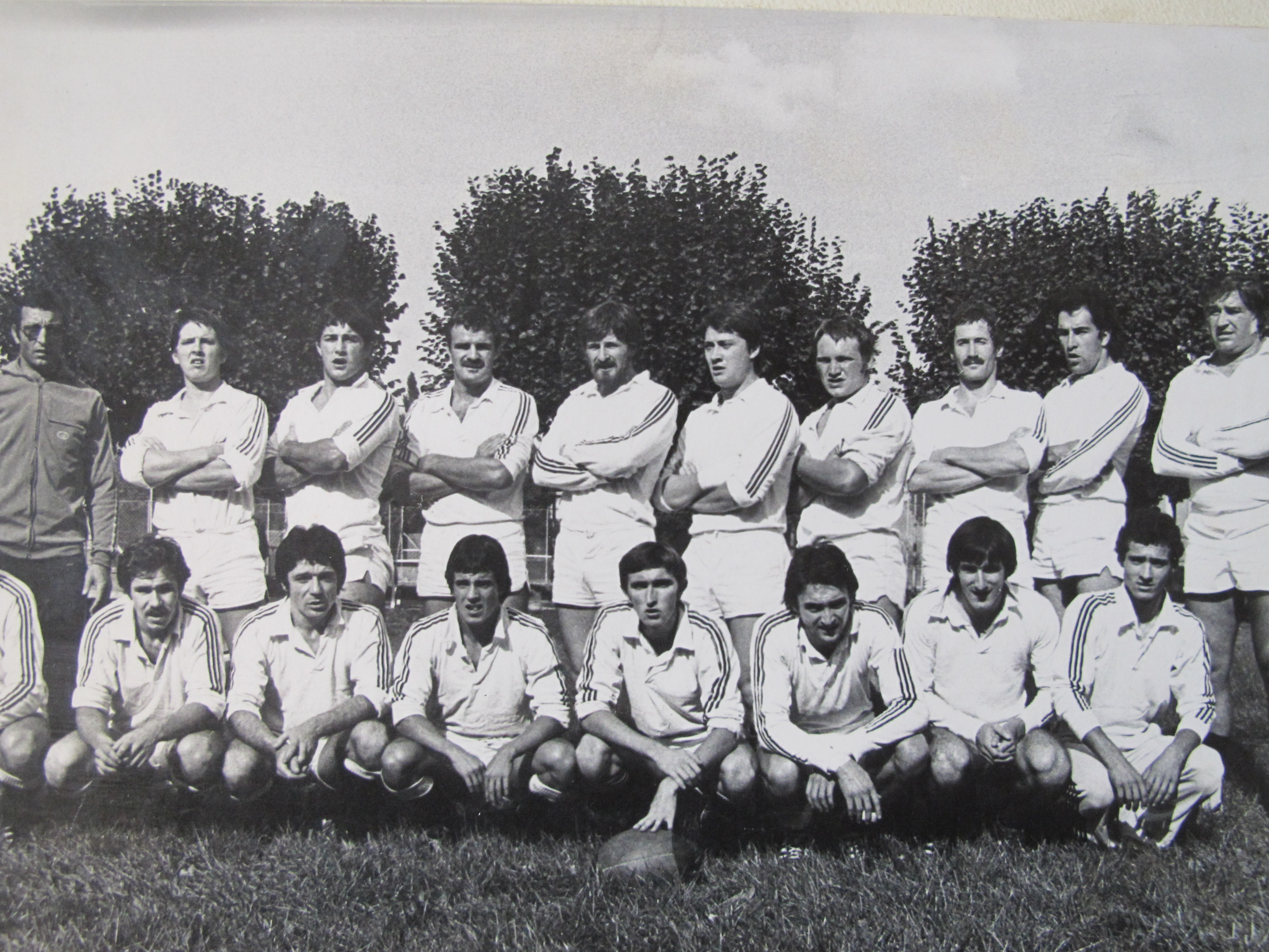 USFL Année 1979